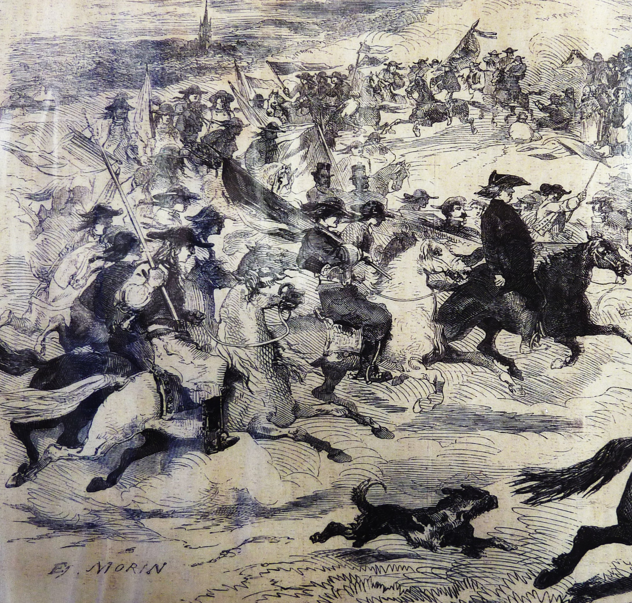 Voyage en Bretagne de Napoléon III : Escorte de leurs majestés impériales Napoléon III et Eugénie de Montijo entre Landerneau et Le Faou